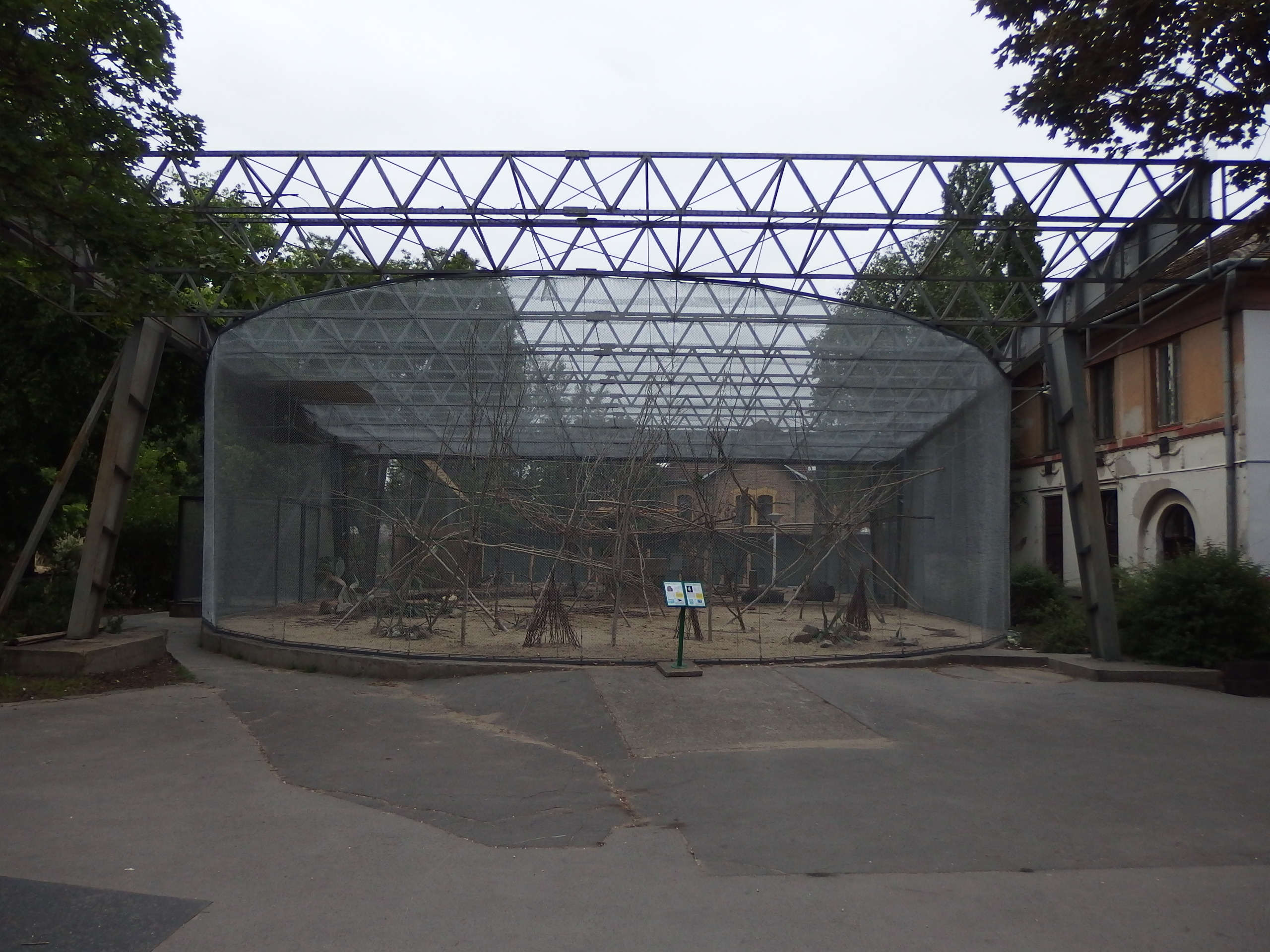 Az egykori Kanyargó tetőszerkezetéből kialakított madárreptető a Holnemvolt Parkban (egykori budapesti vidámpark)